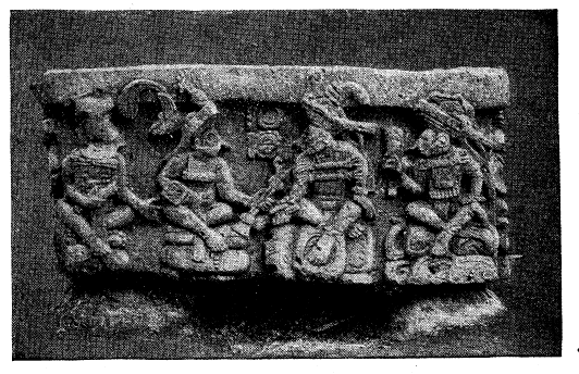 Stela B. Front